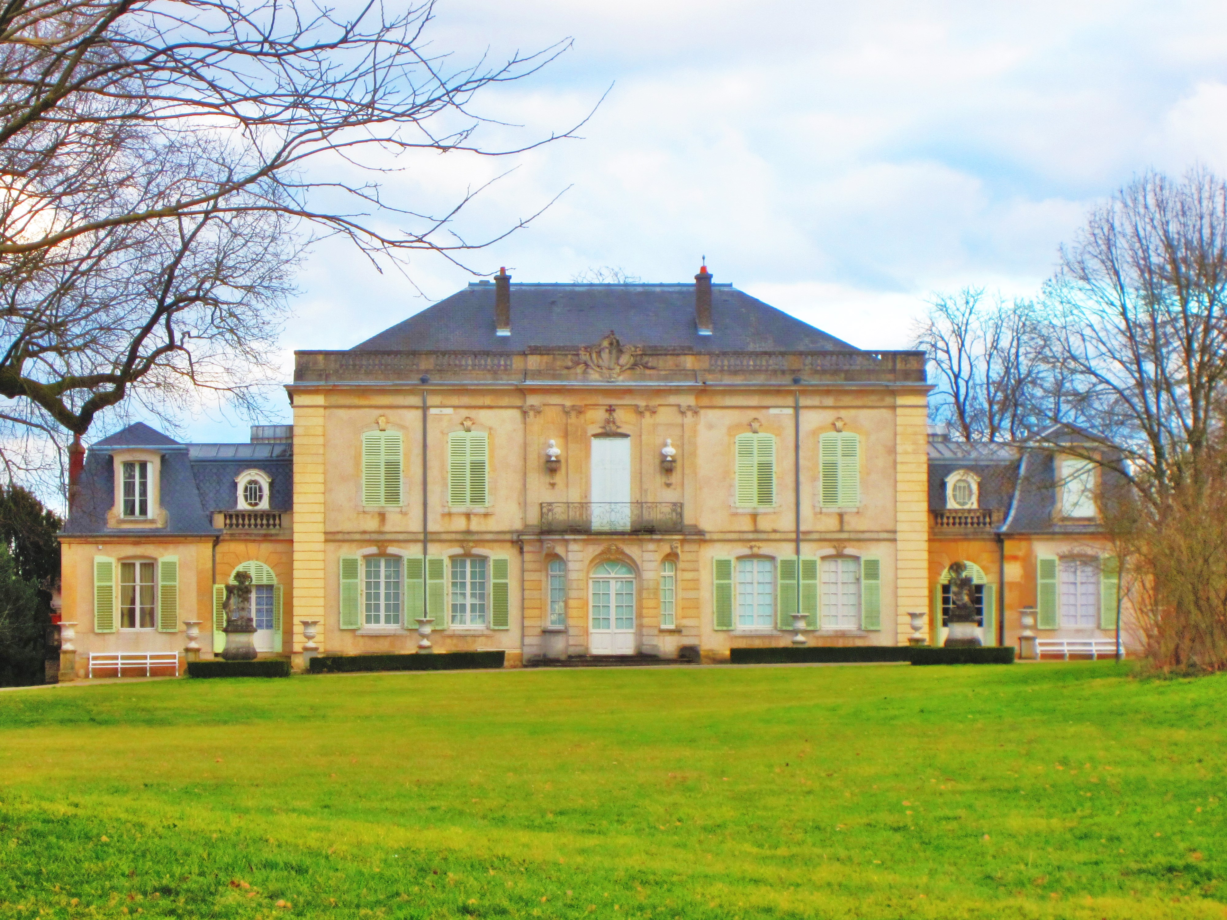 Laneuveville chateau montaigu